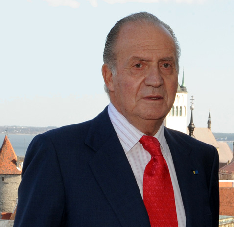 Rey Juan Carlos I de España en su visita de estado a Estonia en mayo de 2009